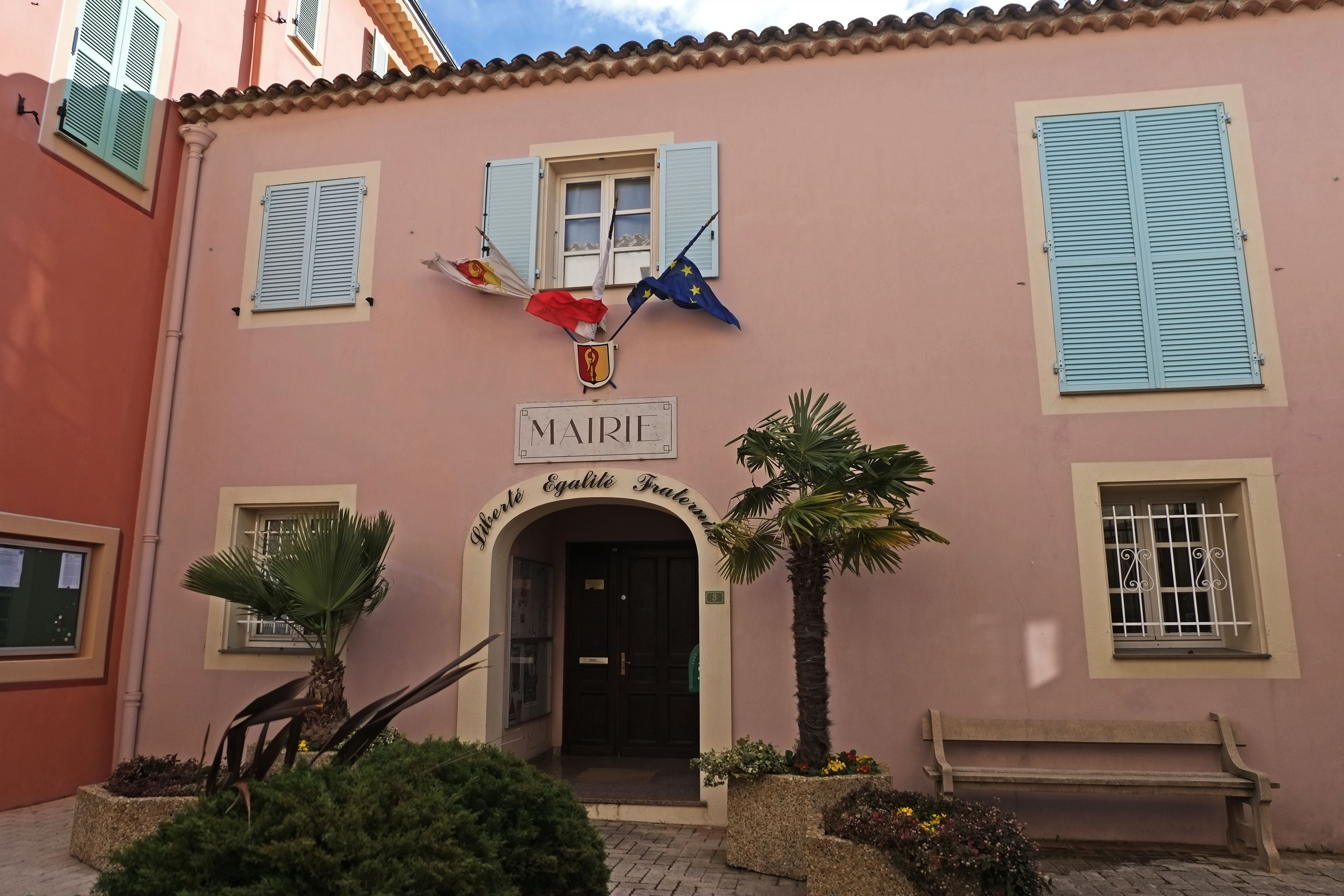 La mairie de Falicon.